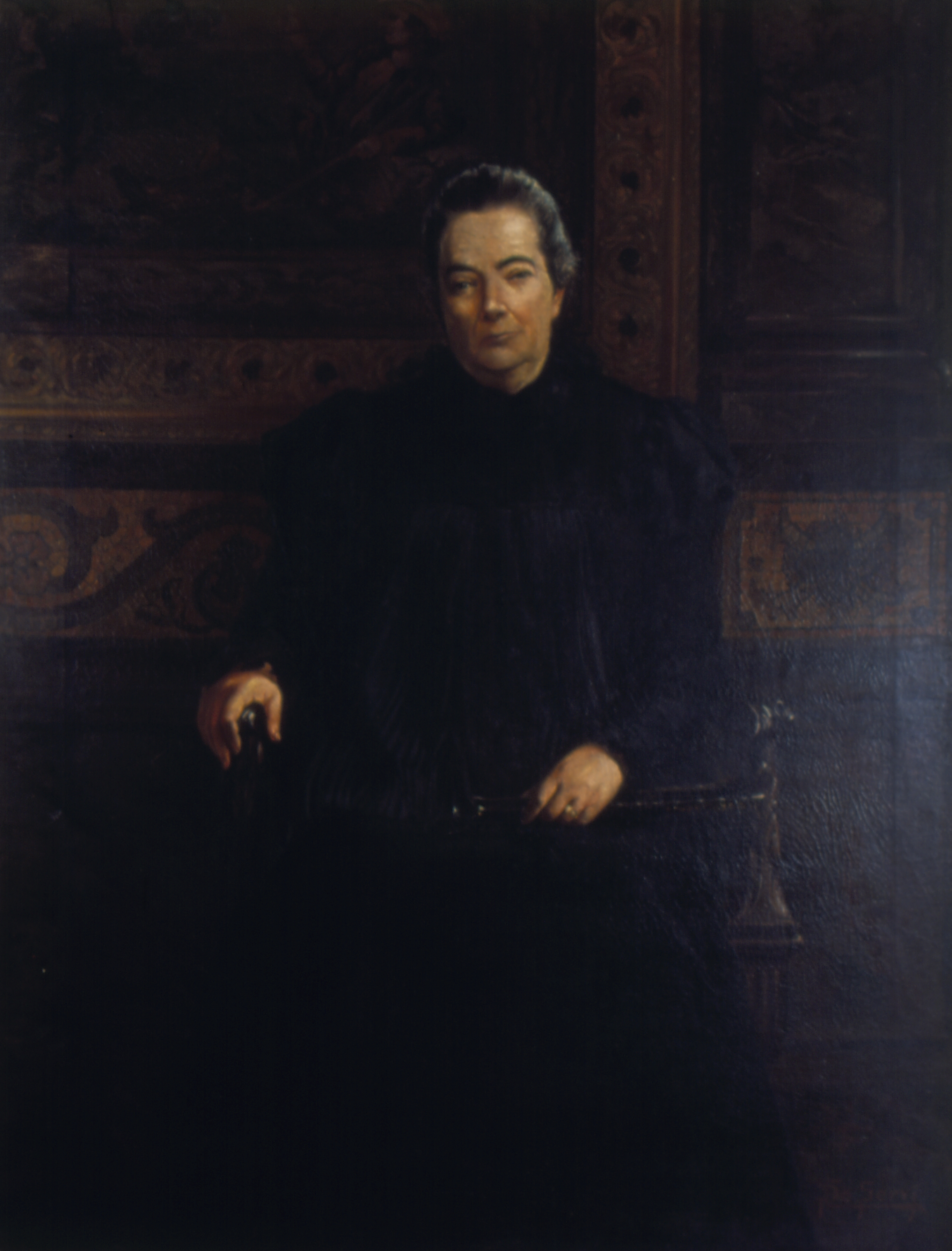 Obra que integra o acervo do Museu Paulista da USP.